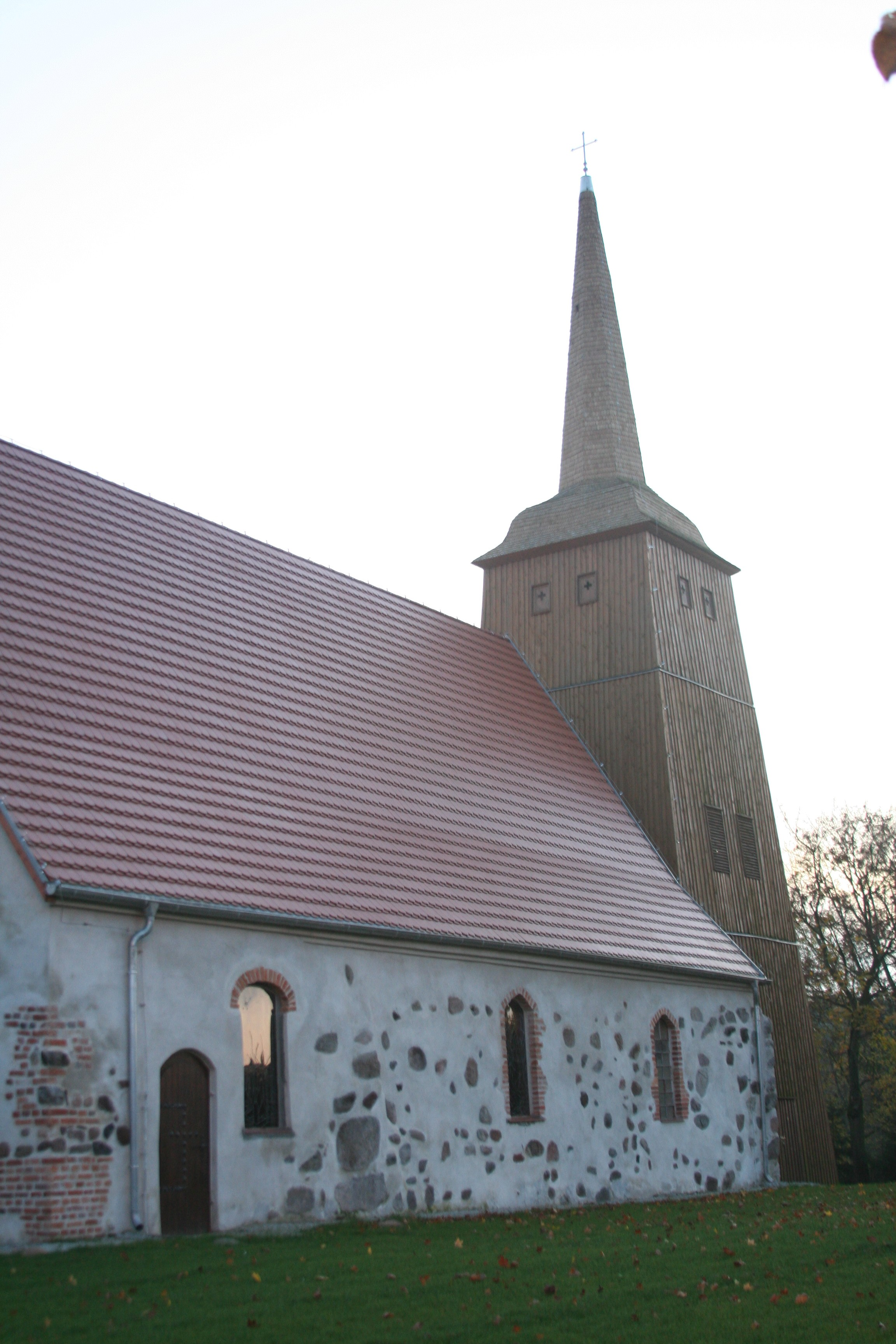 Kościół w Barnimiu